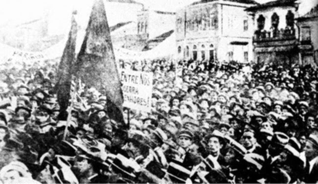 Manifestação na Praça da Sé, em São Paulo, em razão do 1º de maio.